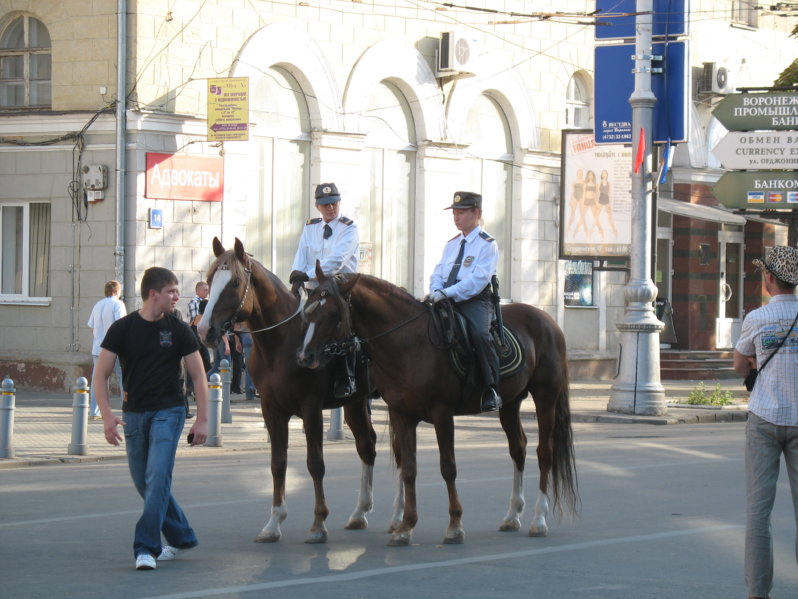 Конная милиция в день города